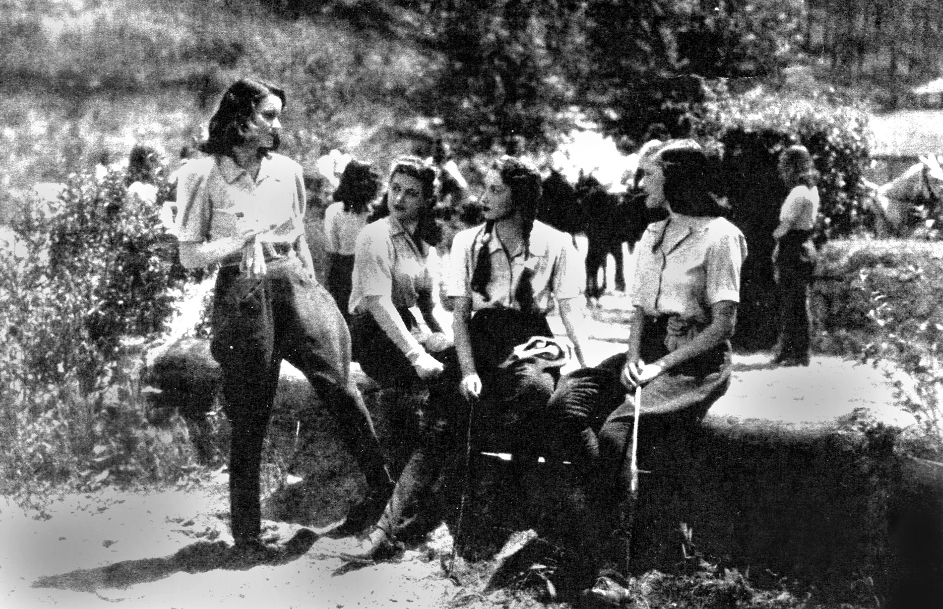 una scena al maneggio in "ore 9 lezione di chimica" (Mattoli, 1941)